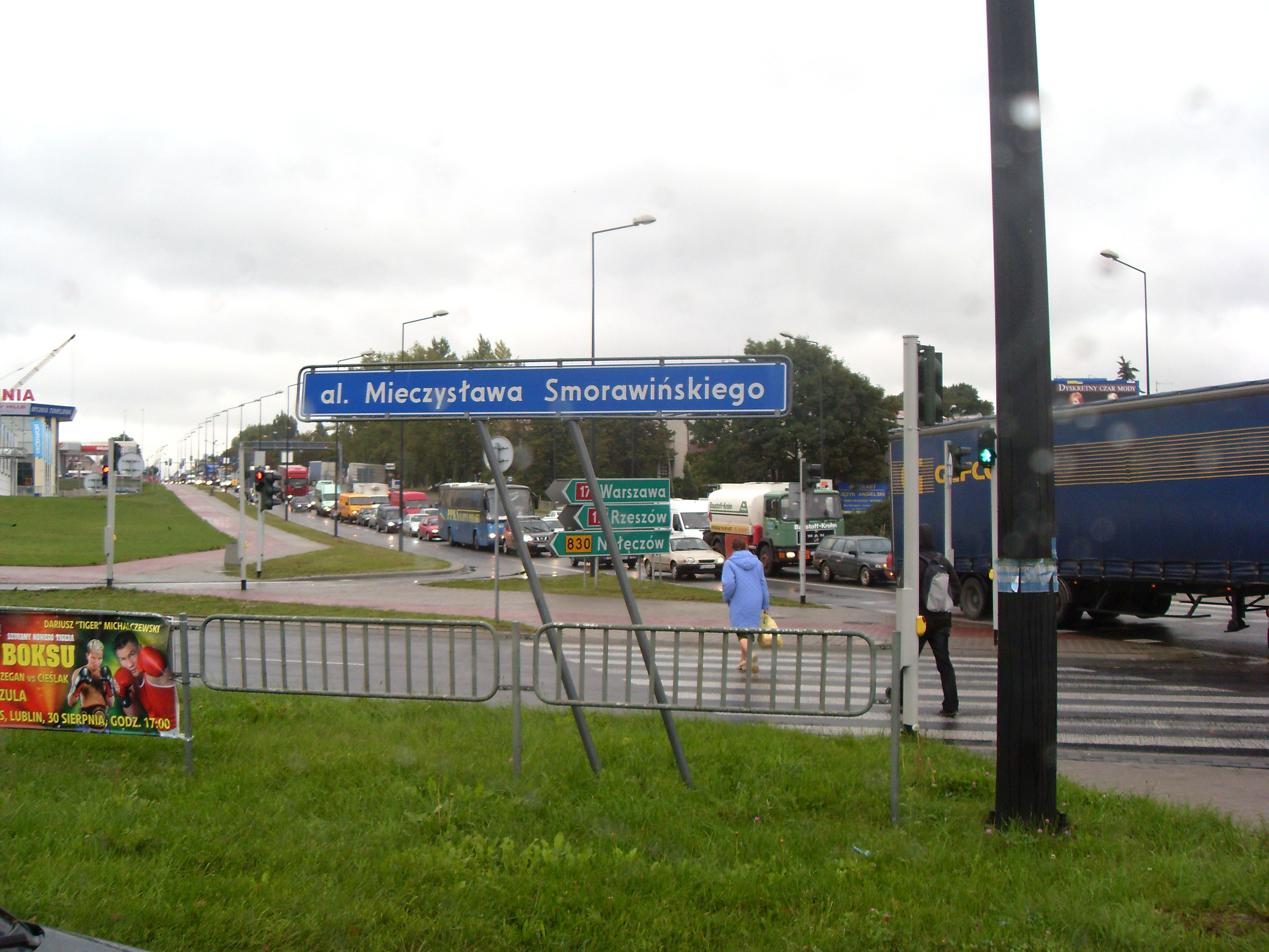 Ulica gen. Mieczysława Smorawińskiego (część dawnej al. Lenina) w Lublinie